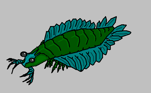 Ilustração do animal Parapeytoia